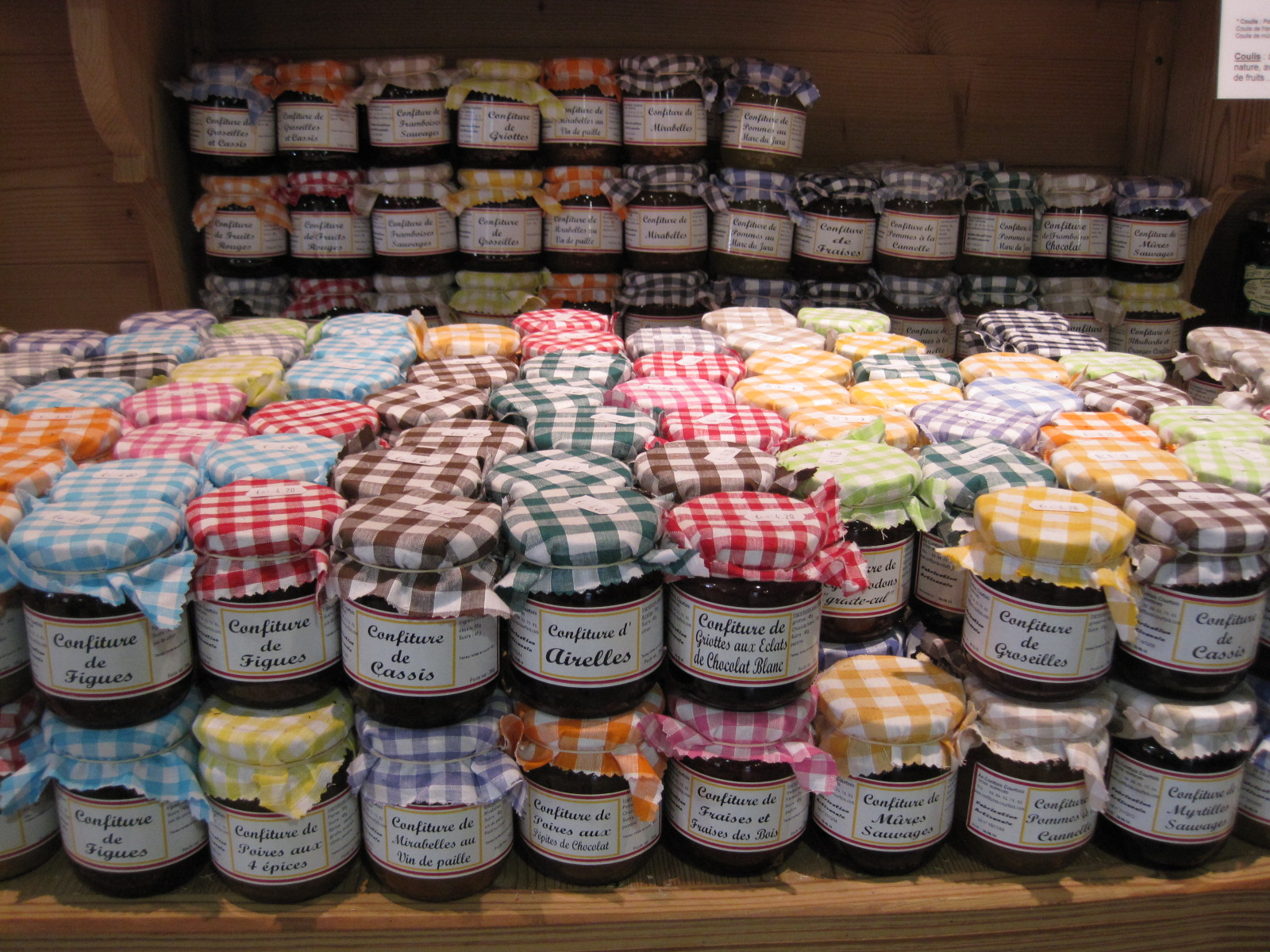 Étalage de confitures